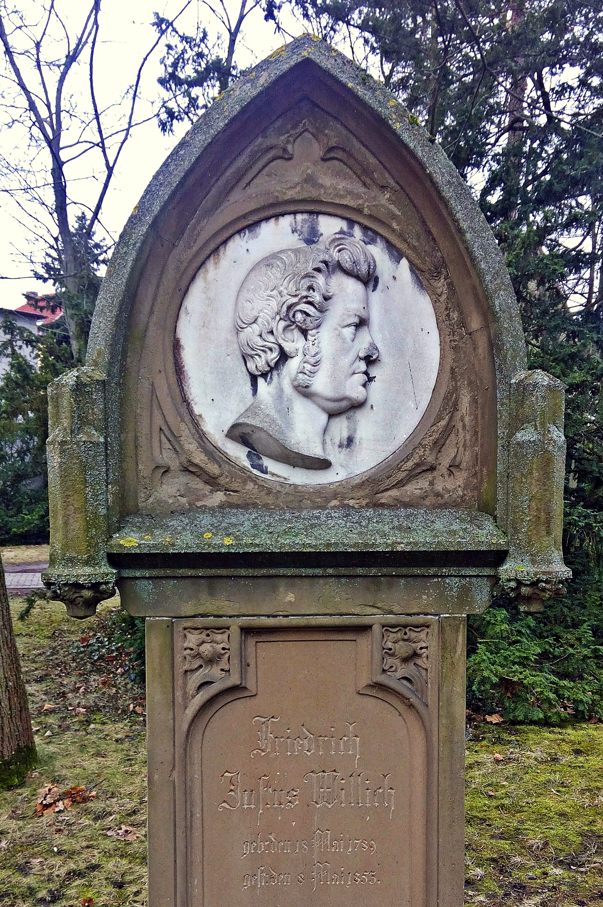 Porträtgrabstein Friedrich Justus Willich (1789-1853) bayerischer Landtagsabgeordneter, Hauptfriedhof Frankenthal